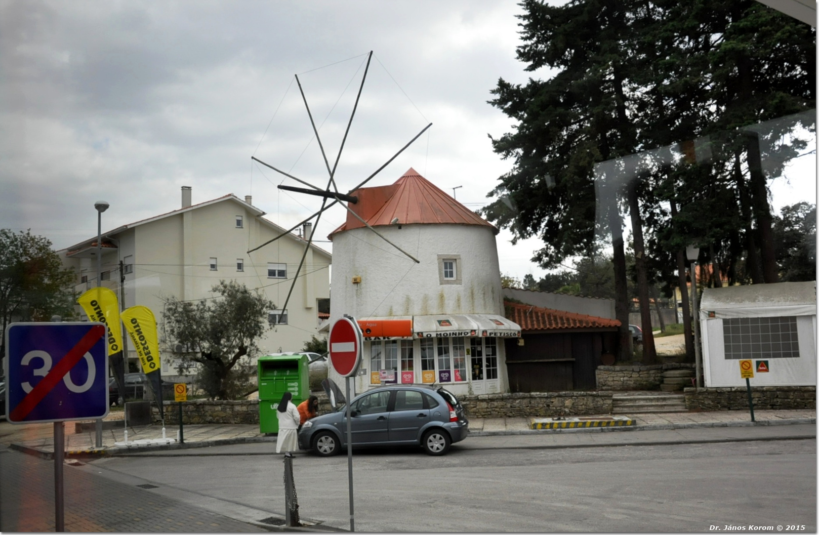 Bar "O Moinho" situado na antiga Estrada de Minde, atual Avenida dos Pastorinhos, em Fátima, Portugal.